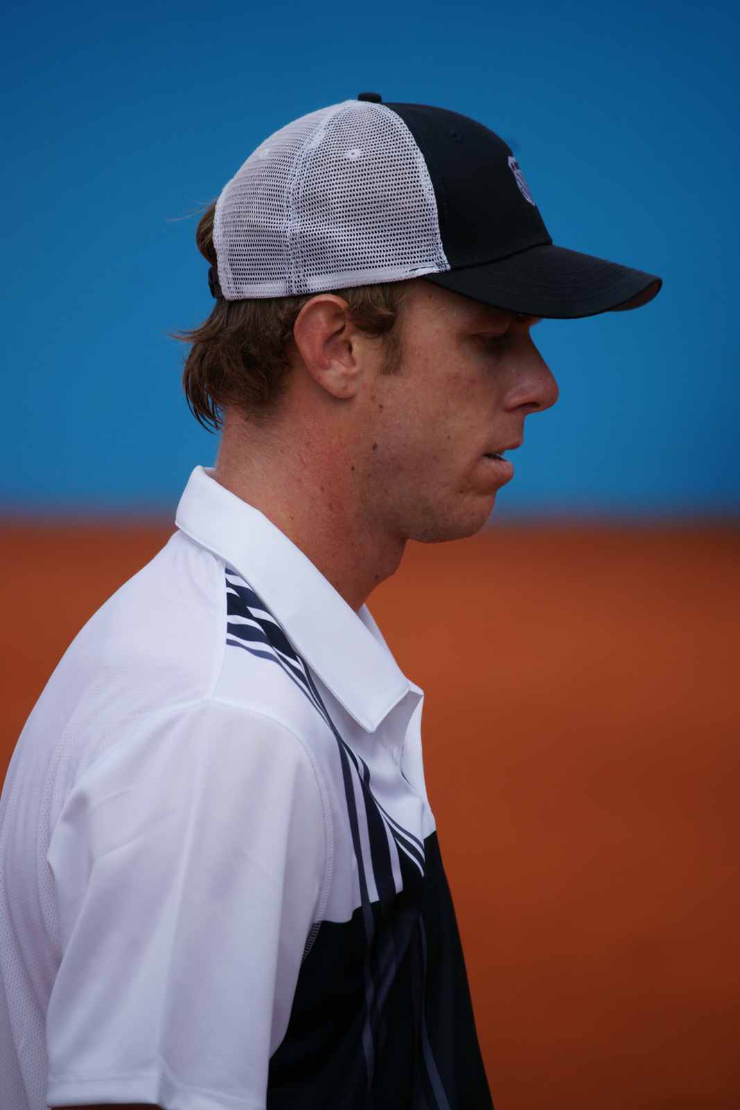 Sam Querrey, Open tennis Nice 2012